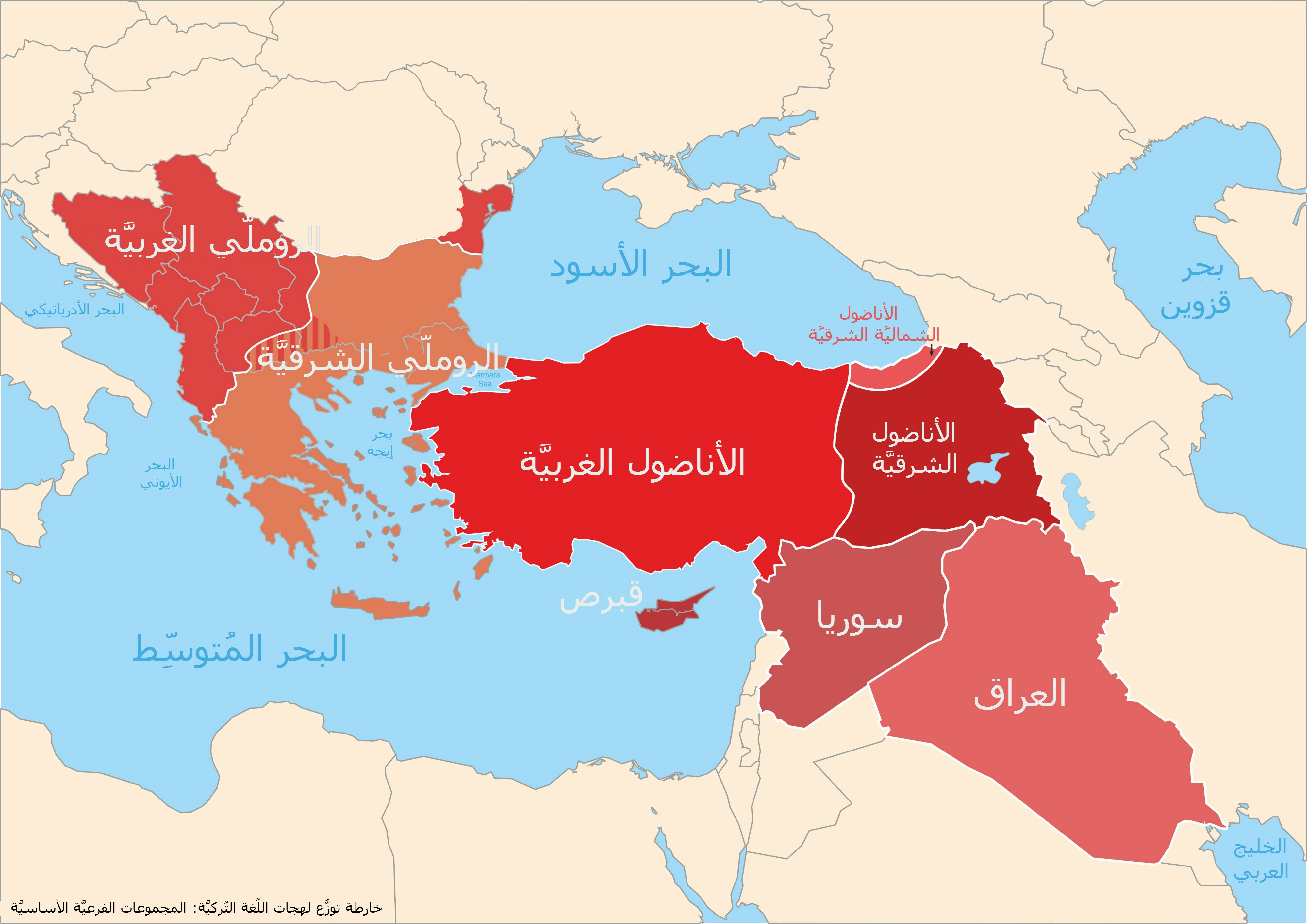 خارطة تُظهر توزُّع لهجات اللُغة التُركيَّة.